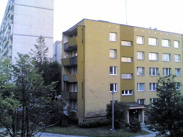 Jeden z typowych bloków na osiedlu Wola Duchacka Wschód w Krakowie.